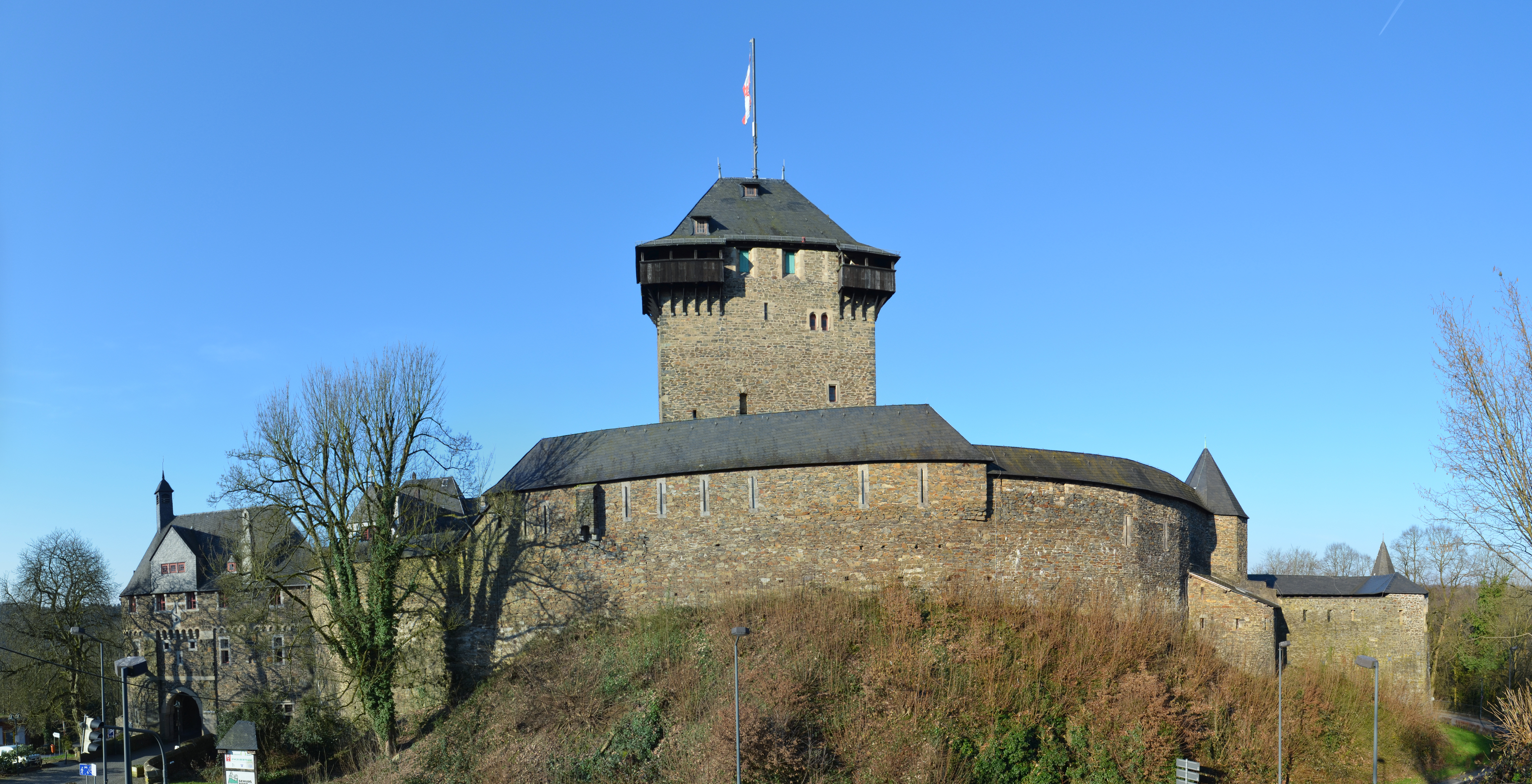 Ostansicht von Schloss Burg in Solingen This image was created with Hugin